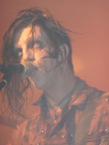 Live-Foto der Band Blitzkid